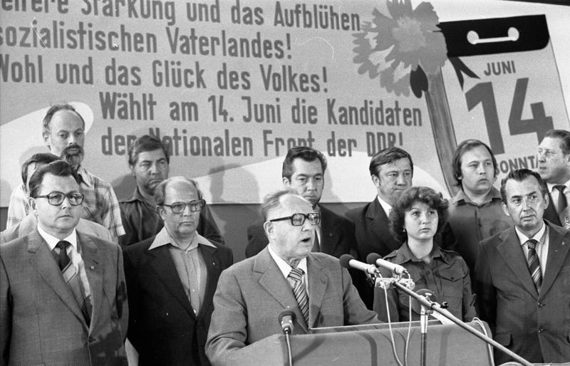 Zeitz, Erich Mielke spricht im Wahlkreis 36 ADN-ZB/Lehmann 26.1.82 Bezirk Halle: Erich Mielke, Mitglied des Politbüros des ZK der SED und Minister für Staatssicherheit, während eines Wählerforums des Wahlkreises 36 (Zeitz, Hohenmölsen, Naumburg), dessen Spitzenkandidat er ist, am 04.06.1981 in Zeitz. Abgebildete Personen: Mielke, Erich: Minister für Staatssicherheit, Armeegeneral, Politbüro des Zentralkomitees (ZK) der SED, DDR (GND 118977490) Hans-Joachim Böhme: ganz links, 1. Sekretär der SED-Bezirksleitung Halle, Mitglied des Zentralkomitees der SED